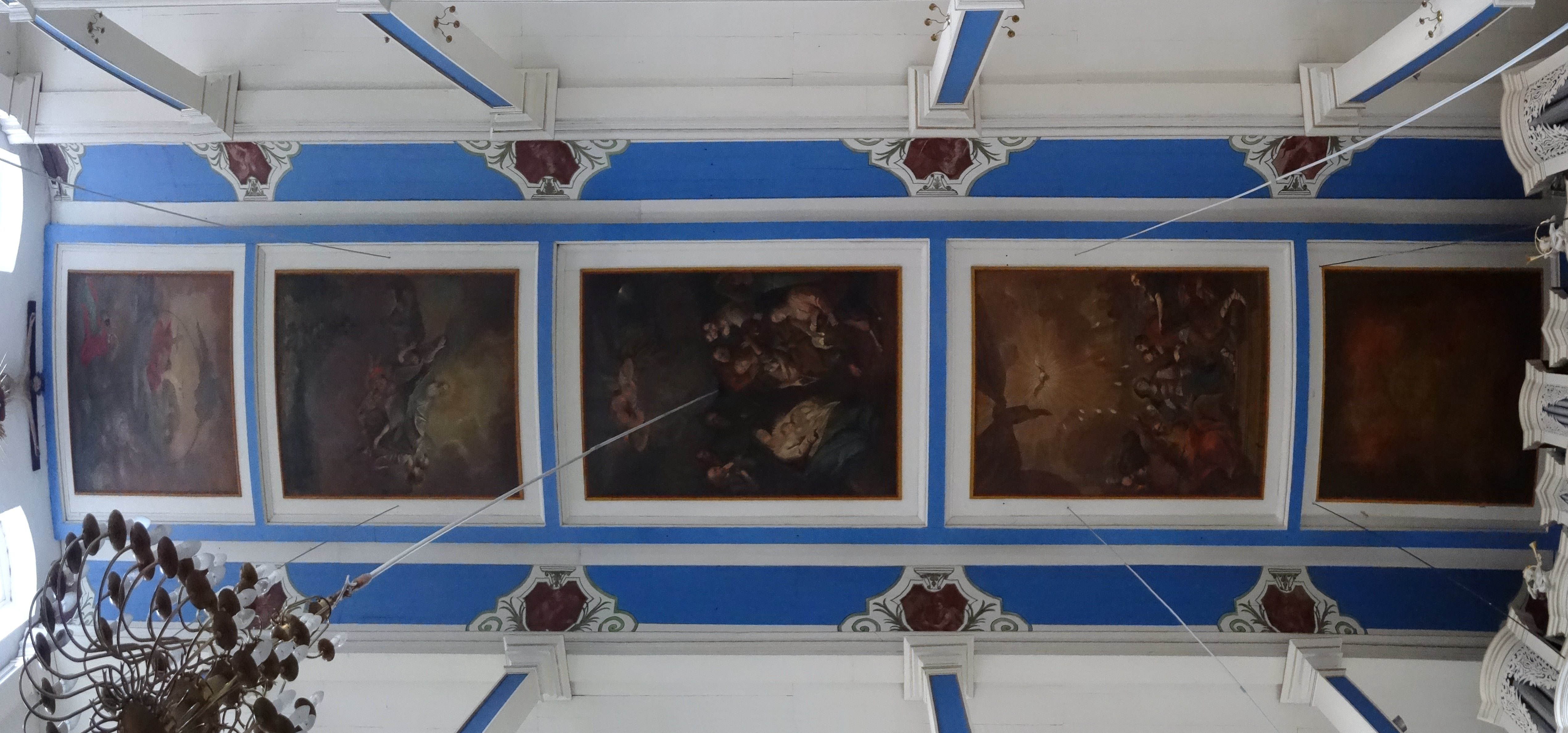 St. Nicolai Sundhausen, Deckengemälde vermutlich um 1740/41 vom Gothaer Hofmaler Johann Heinrich Ritter (1685/90-1751). Es sind vier Deckengemälde erhalten: 1.Die Heilige Dreieinigkeit - Gott Vater, Sohn und Heiliger Geist, hier als Taube dargestellt. 2.Die Erschaffung der Welt - Gott Vater im Kreise seiner Engelschaar freut sich an seiner Schöpfung. 3.Christi Geburt - Maria, als Mutter Gottes trägt ein weißes Unterkleid mit blauem Gewand darüber. 4.Die Ausgießung des Heiligen Geistes.